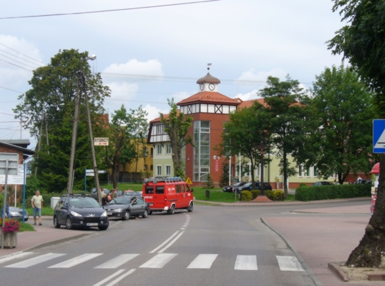 Sierakowice (województwo pomorskie)